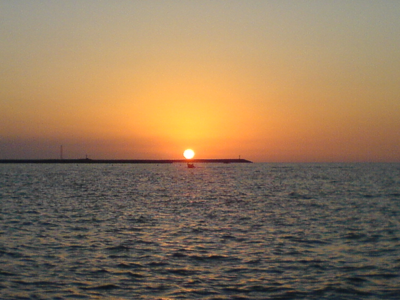 Caspian Sea Sunset